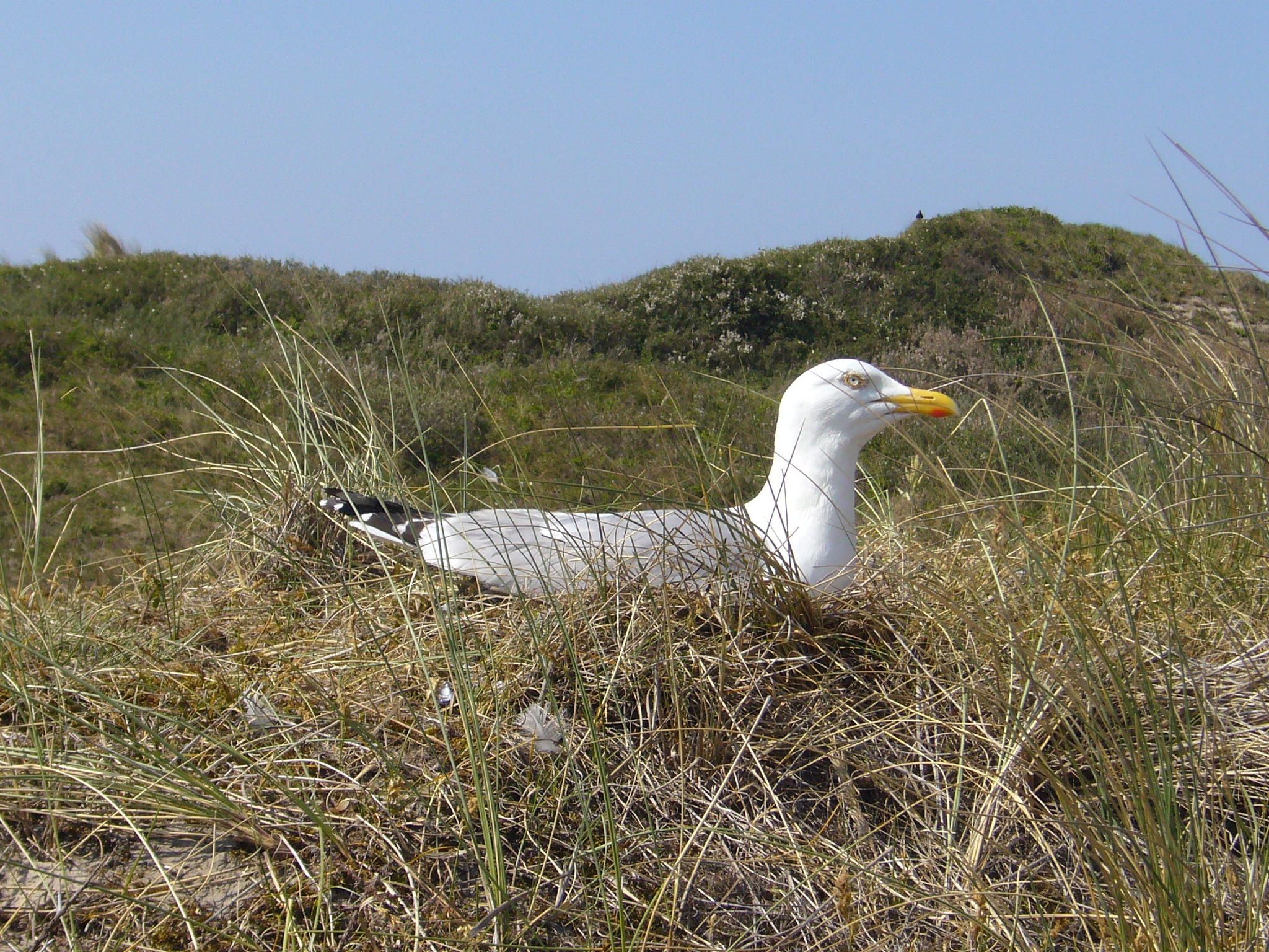 Zilvermeeuw (Larus argentatus) op nest in de duinen van Texel This is a photo or sound file made in Dunes of Texel National Park in the Netherlands, with the main subject of the file in the category: animals